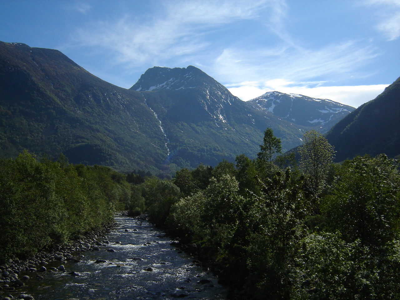 Zdjęcie zrobione w mieście Rosendal, Kvinnherad. Widok na rzekę Hattebergselva. W tle góry Melderskin i Laurdalstind.